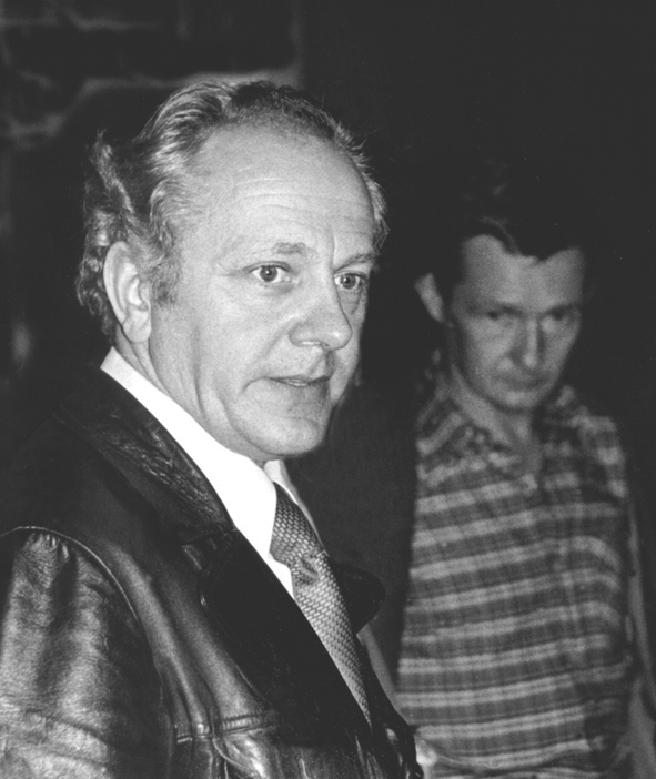 Fryderyk Kremser; działacz PTTK; portret z 1976 roku autorstwa Mirosława Zbigniewa Wojalskiego z Łodzi. W głębi Andrzej Przedlacki, przyjaciel i współpracownik Fryderyka Kremsera.